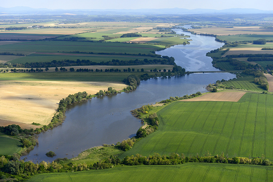 Deseda-tó légi felvételen